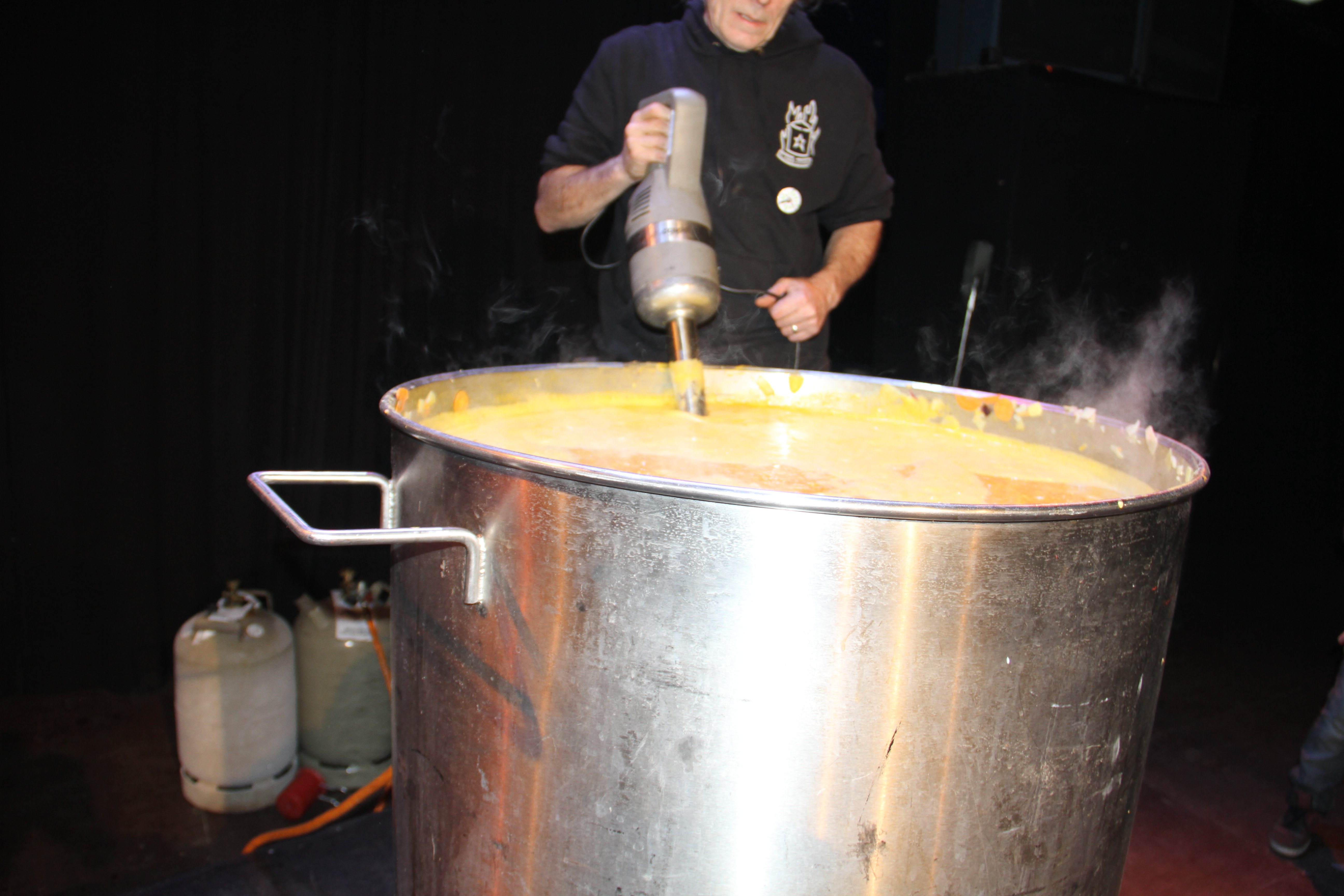 Wir haben es satt!2014-SchnippelDisko